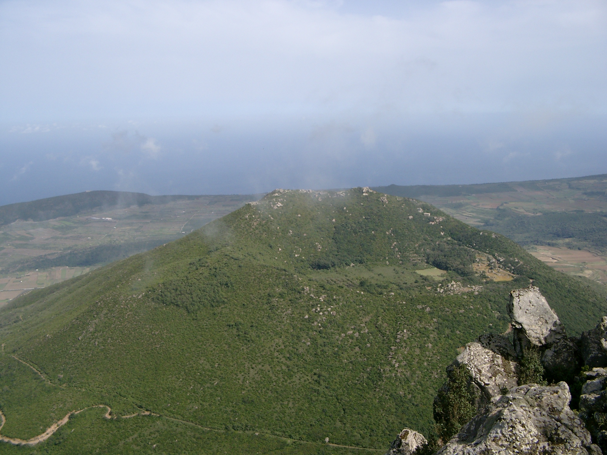 Insel Pantelleria - Der Monte Gibelè von der Montagna Grande aus gesehen